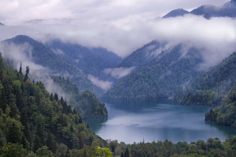 Ирон: Рицæйы цад